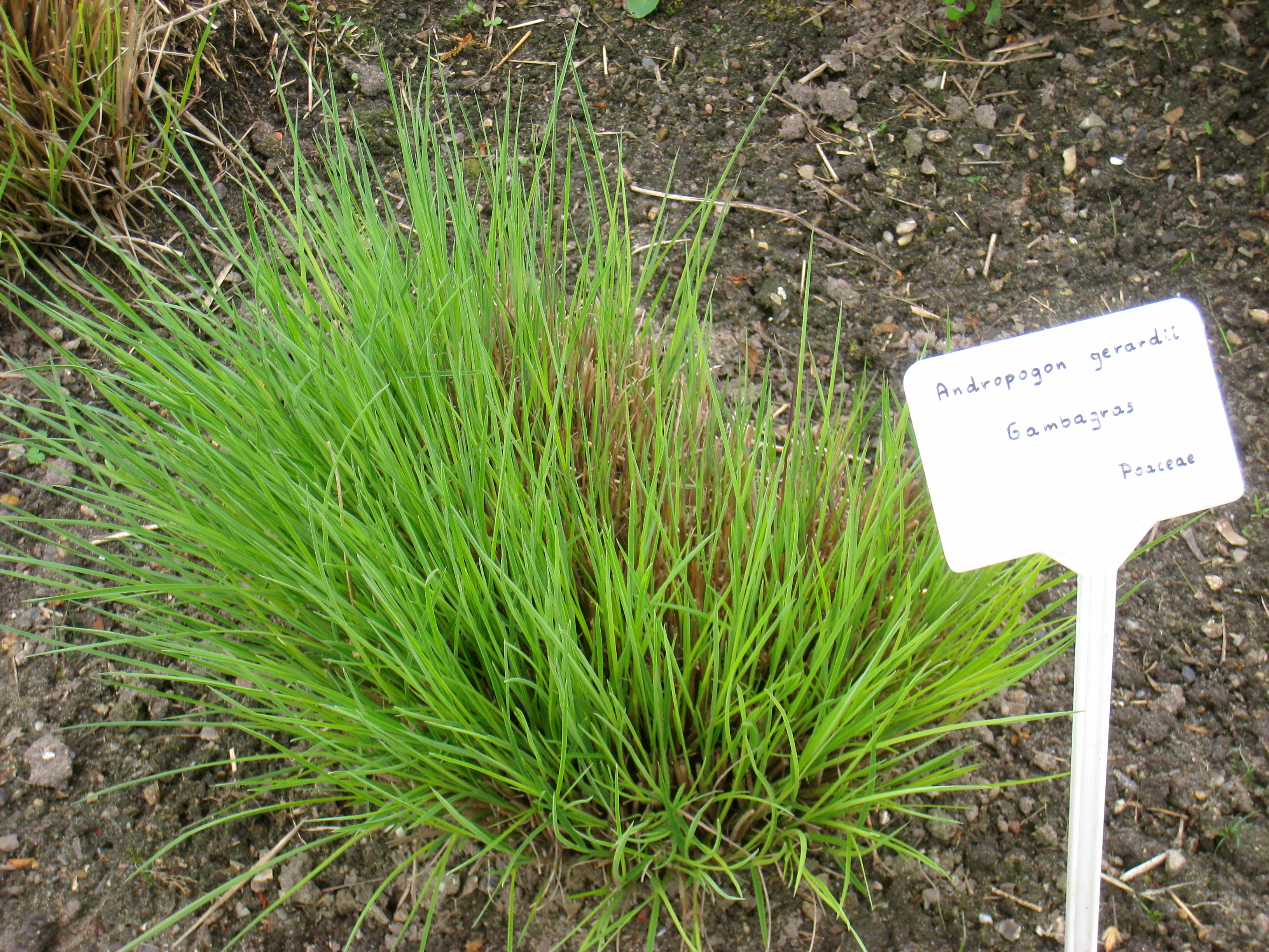 Andropogon gerardii specimen in the Botanischer Garten, Berlin-Dahlem (Berlin Botanical Garden), Berlin, Germany.